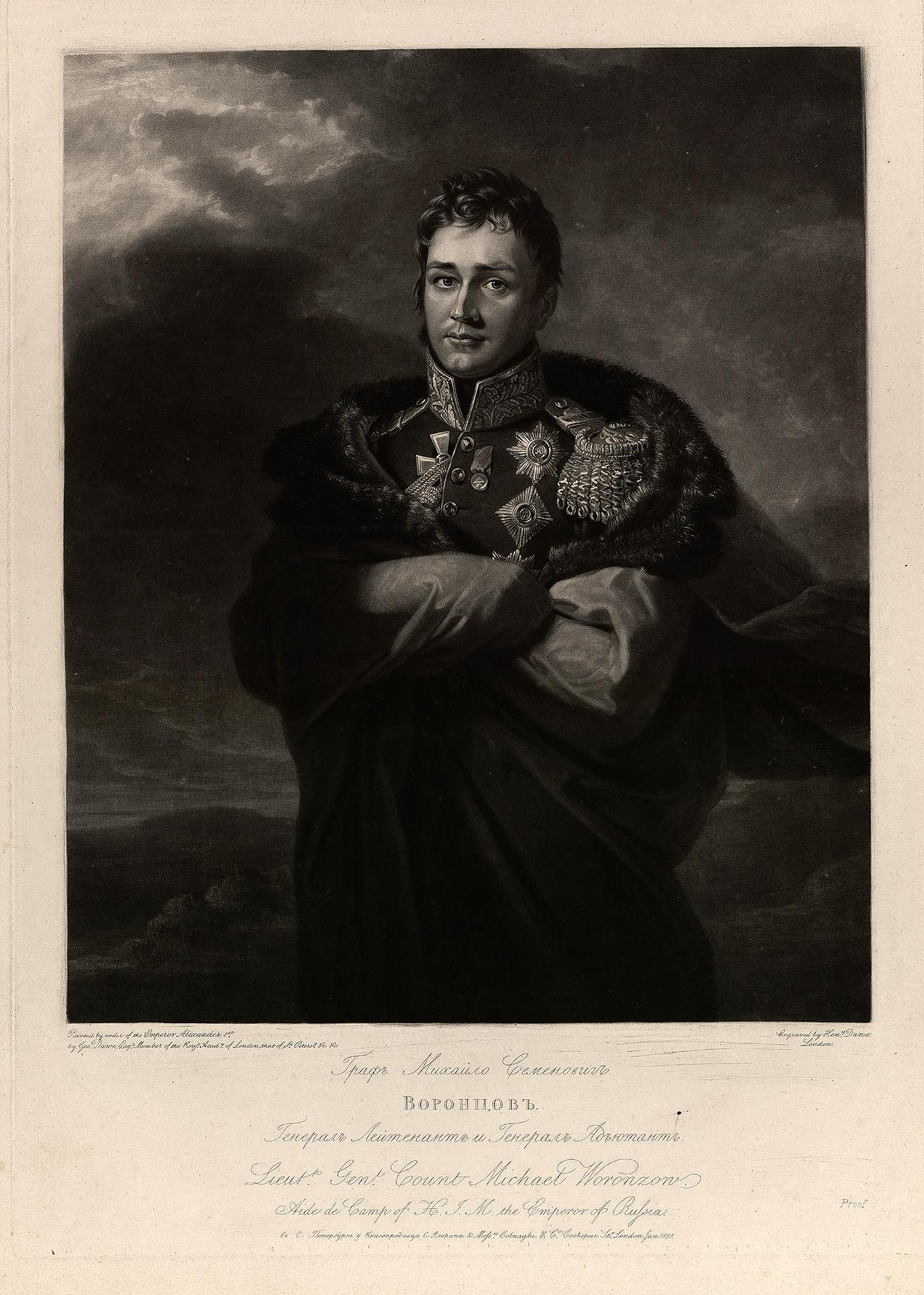 Портрет генерала графа М. С. Воронцова